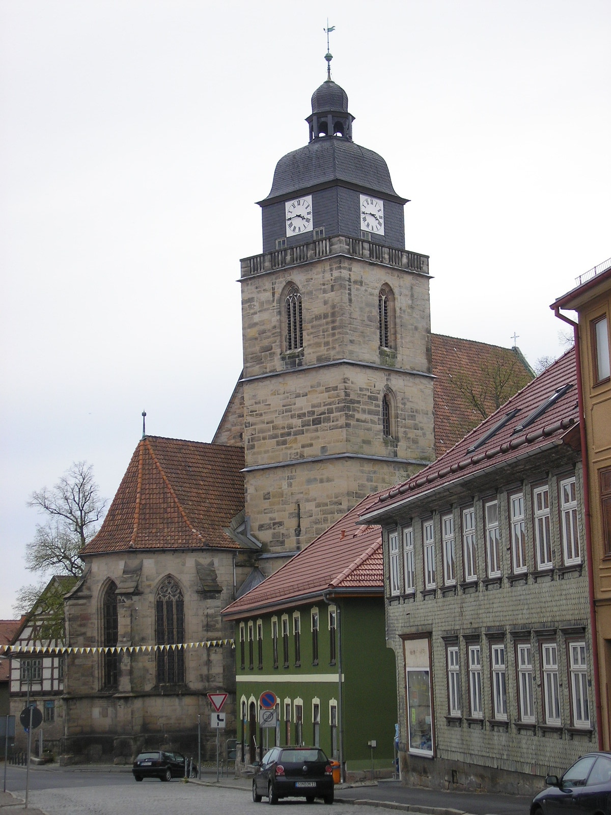 Die Stadtkirche von Eisfeld (Thüringen).